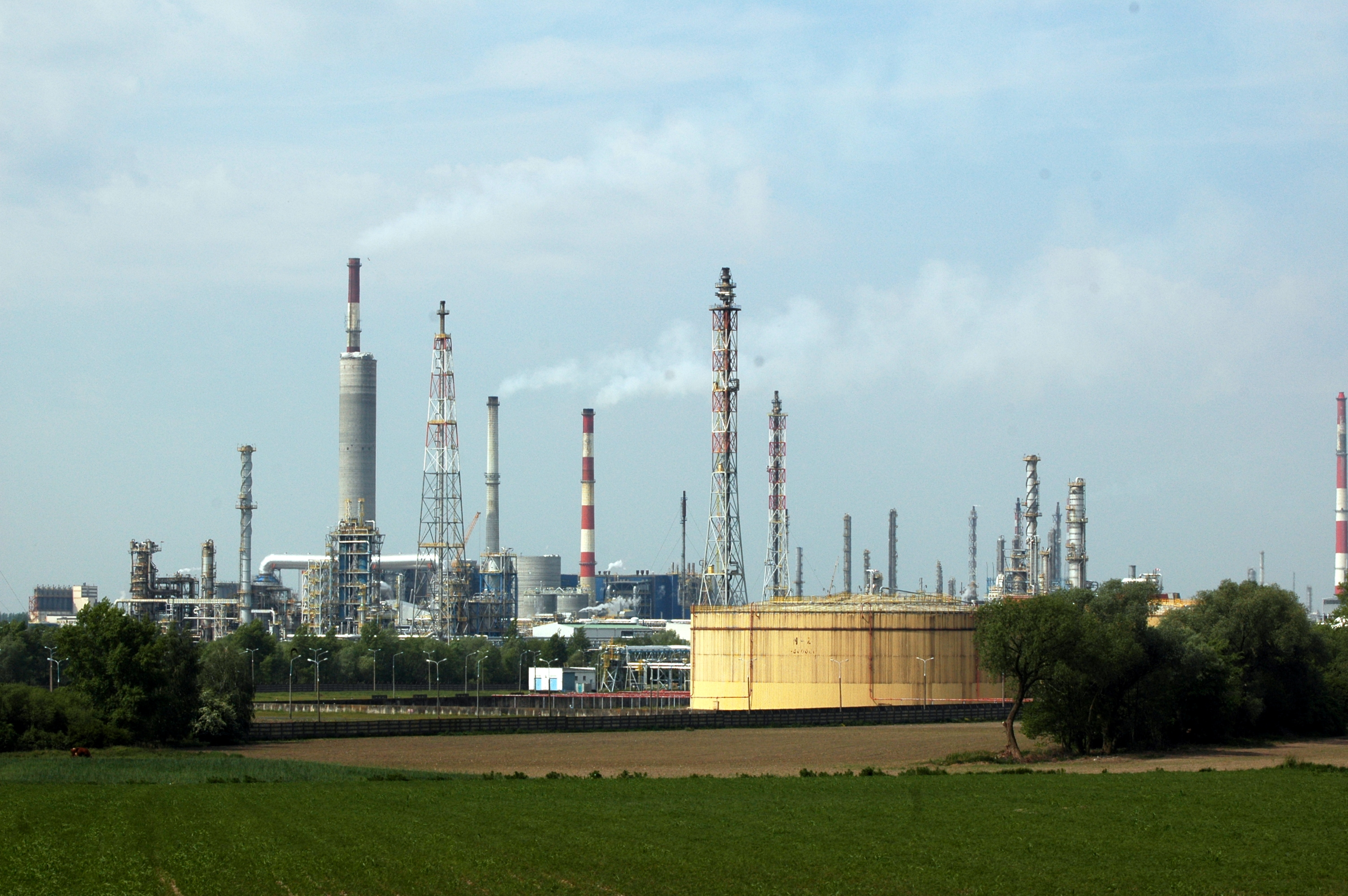 Petrochemia płocka PKN Orlen